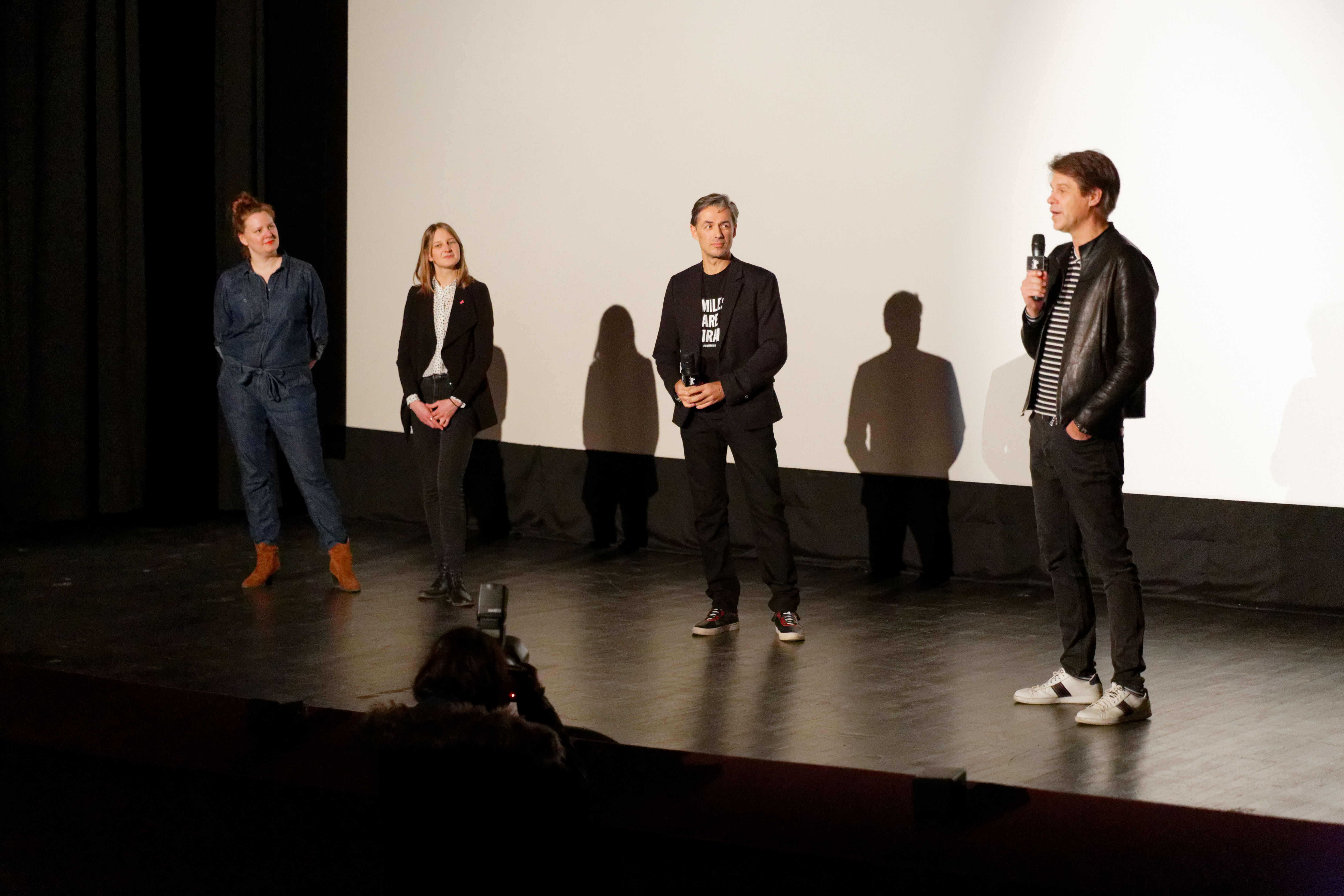 Premiere des Films Tiere (Animals) im Rahmen der Sektion Forum der Berlinale 2017